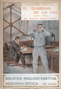 Cubierta del libro El guardián de la paz del Coronel Ignotus (1924), realizada por Mariano Pedrero López (1865-1927)